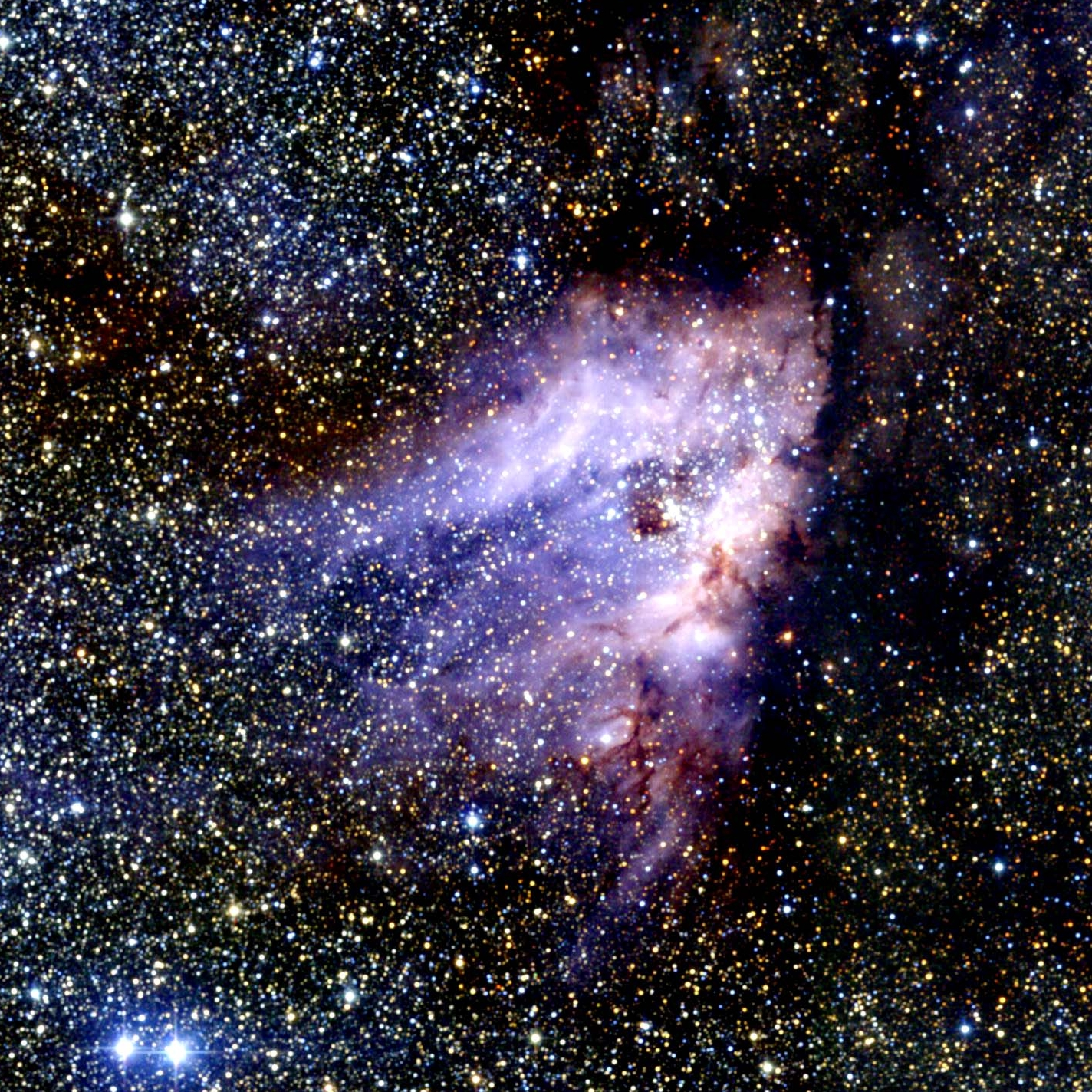 Messier object 017.